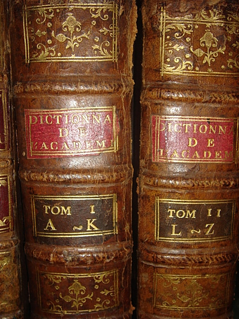 Dictionnaire de l'Académie française, en 2 volumes